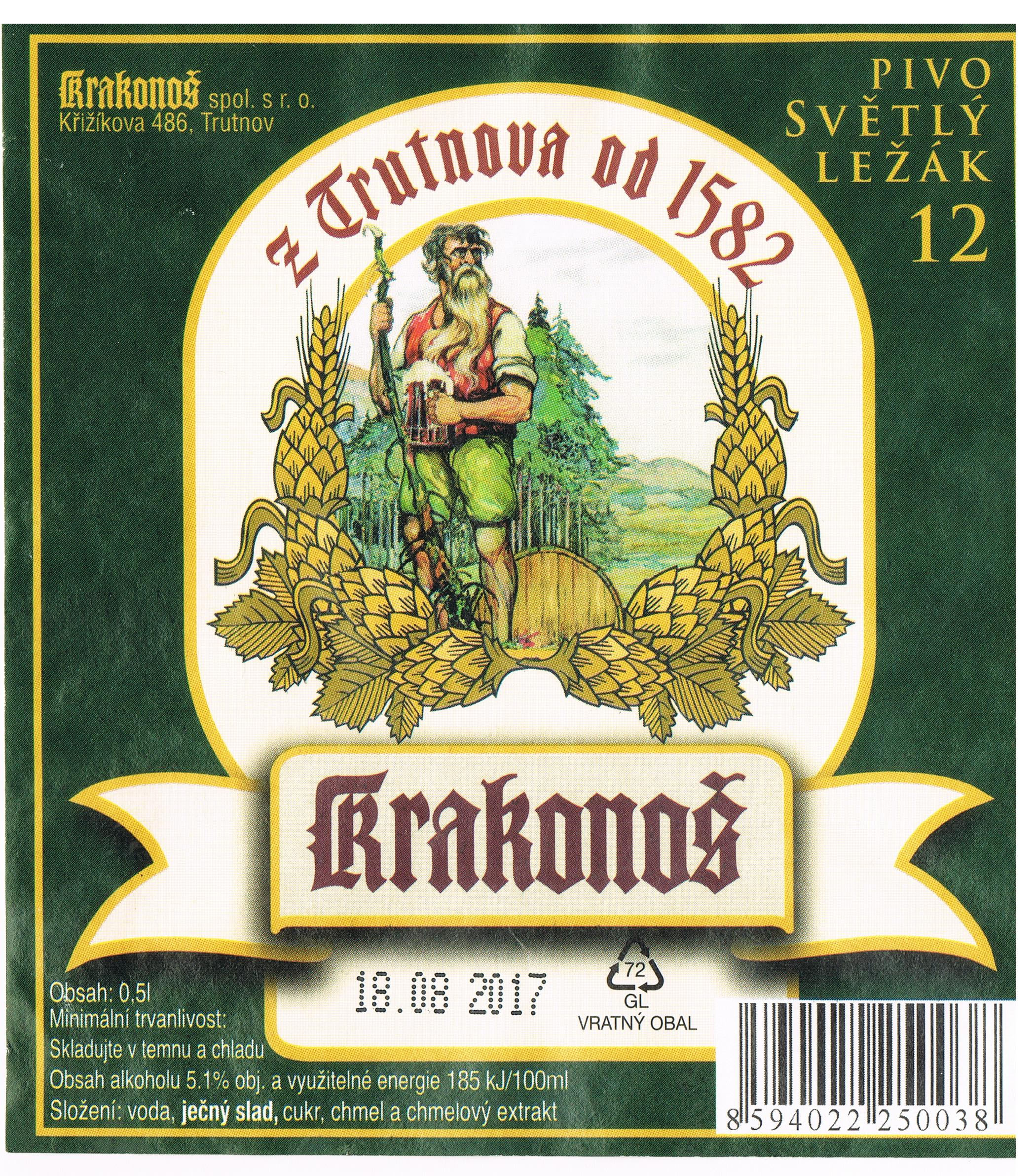 Etykieta piwa Krakonoš (Trutnov)